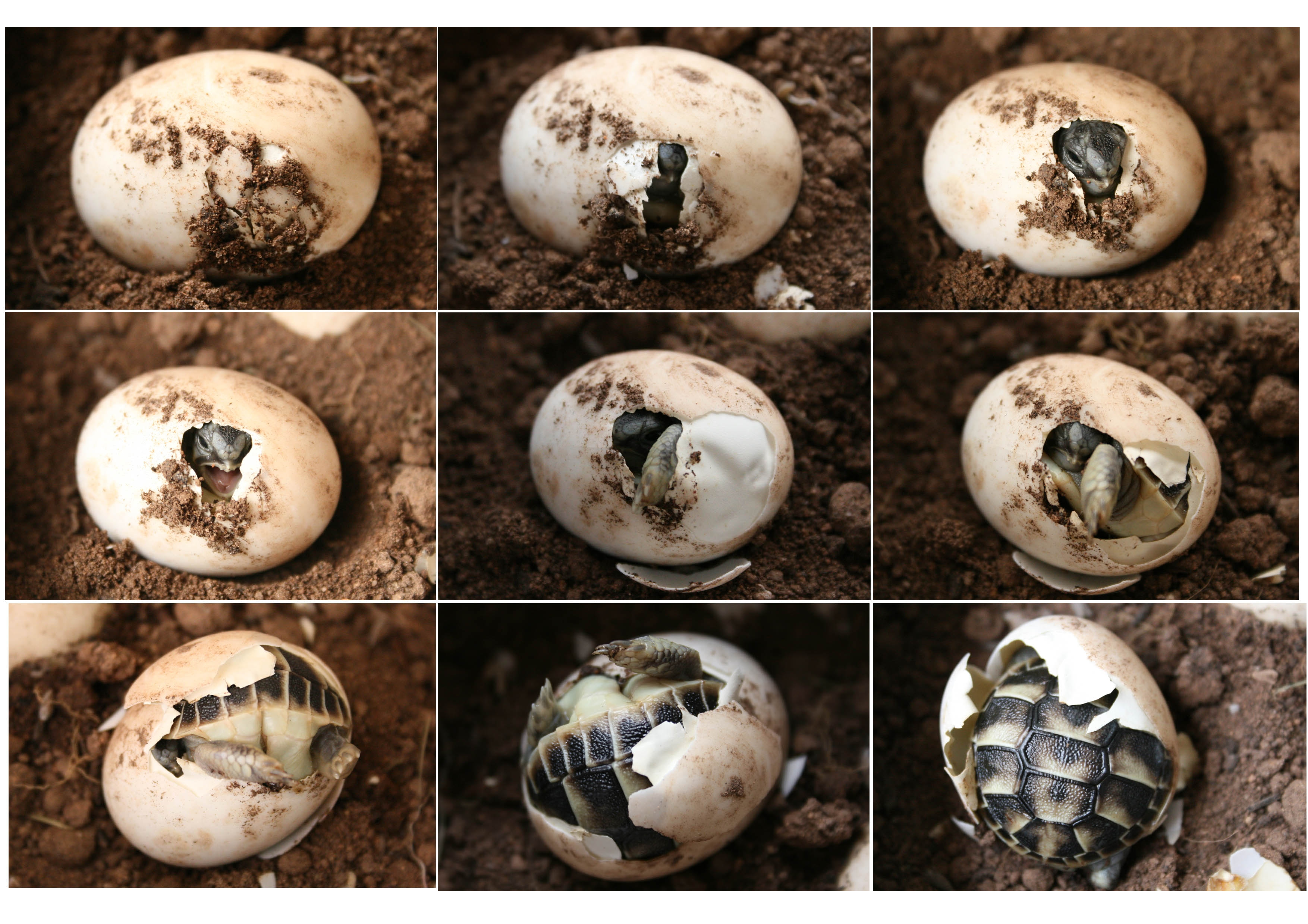 photos prises par Michèle Gérolami à LA GARDE (VAR) et mises à disposition par Henri Pidoux